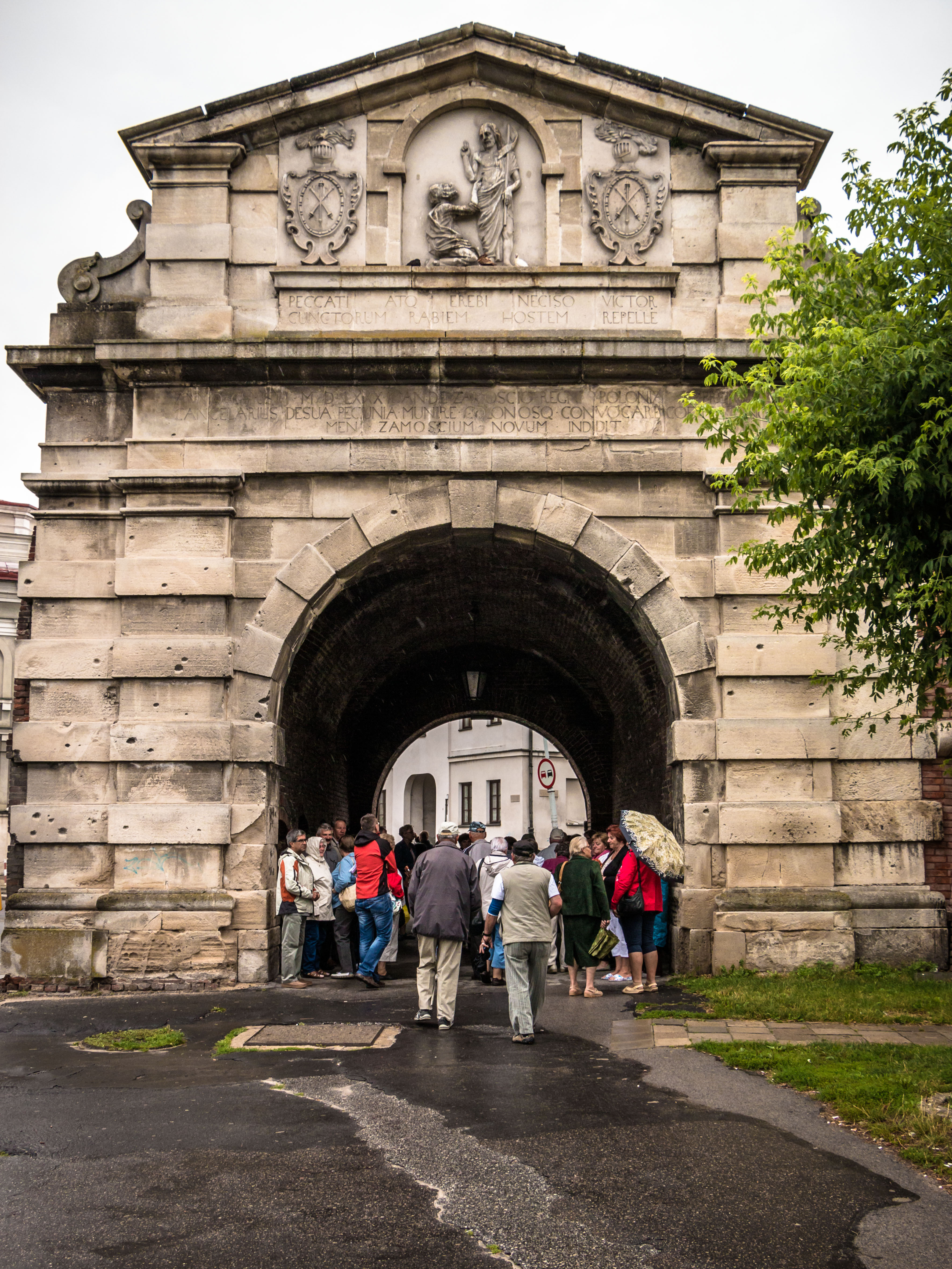 Zamość, Brama Lwowska Stara (1597-99 r., ok. 1820, 1938-39 r., 1980 r.)